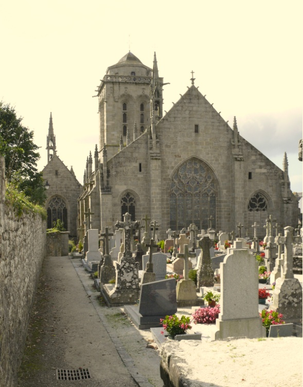 Locronan